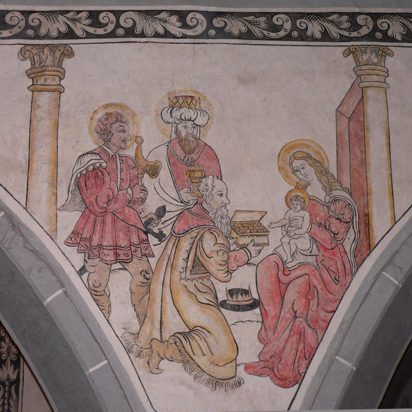 Evangelische Kirche St. Laurentius in Dassel, Niedersachsen, Deutschland - Protestantische Renaissancemalerei (Secco): "Heilige Drei Könige" von 1577